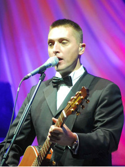 Kovács Ákos, Kossuth-díjas magyar dalszerző, zeneszerző, költő, Ákos néven énekes-előadóművész